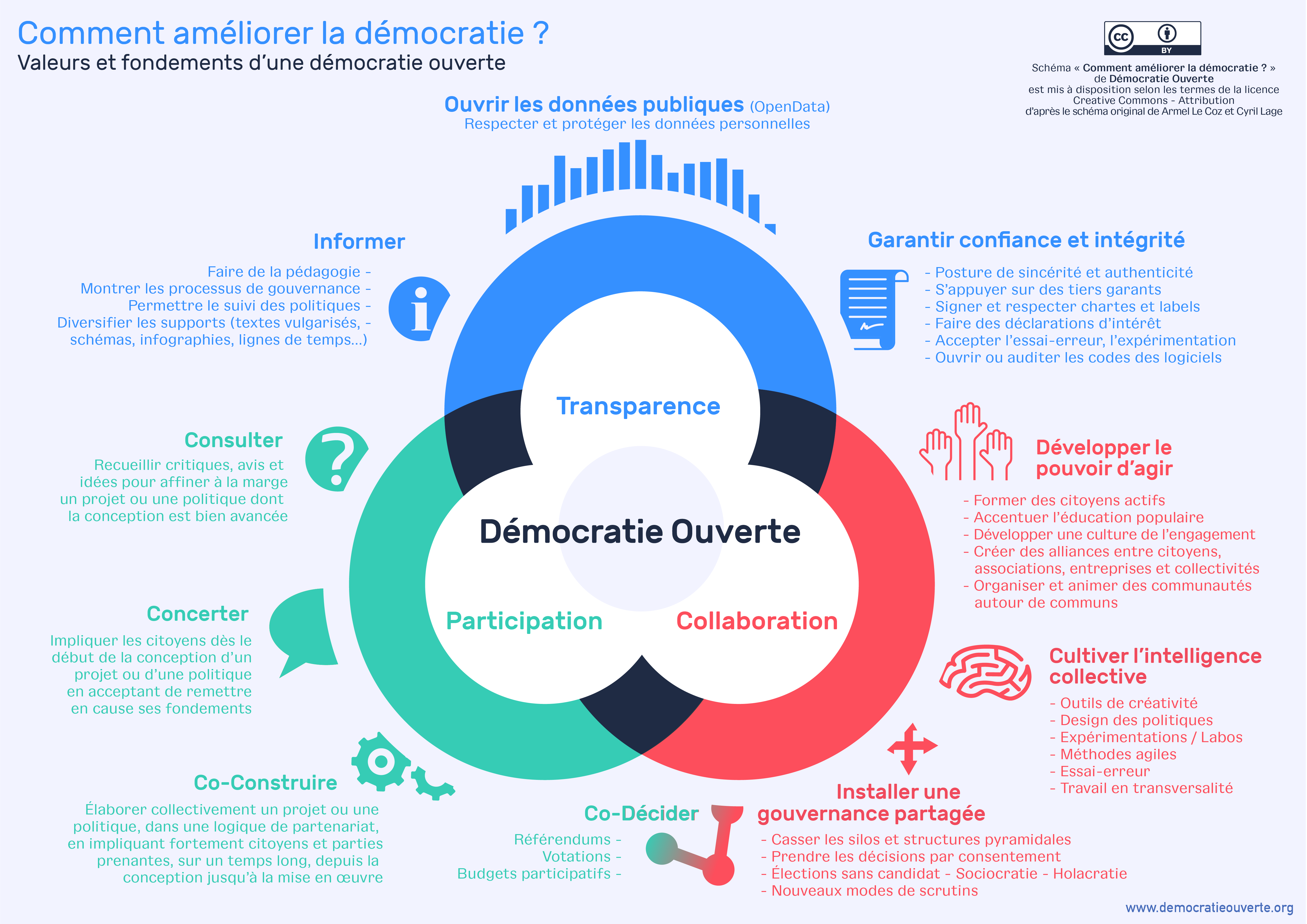 Schéma représentant les 3 piliers de la démocratie ouverte : - Transparence - Participation - Collaboration